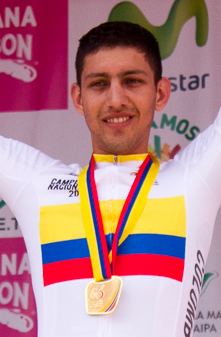 CRI Hombres Elites Campeonatos Nacionales de Ruta Boyacá 2016. Walter Vargas en el podio.